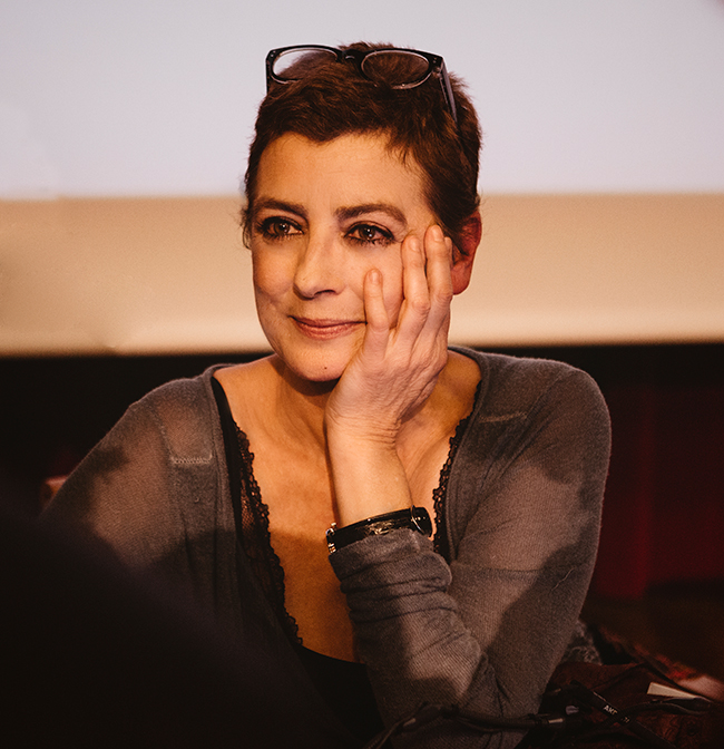 Ángeles Caso presentando su libro"Ellas Mismas. Autorretratos de pintoras"